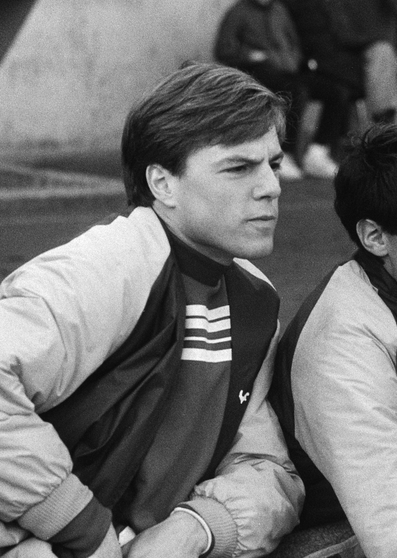 Willem II-doelman Hans Galjé op de bank tijdens de wedstrijd tegen Ajax